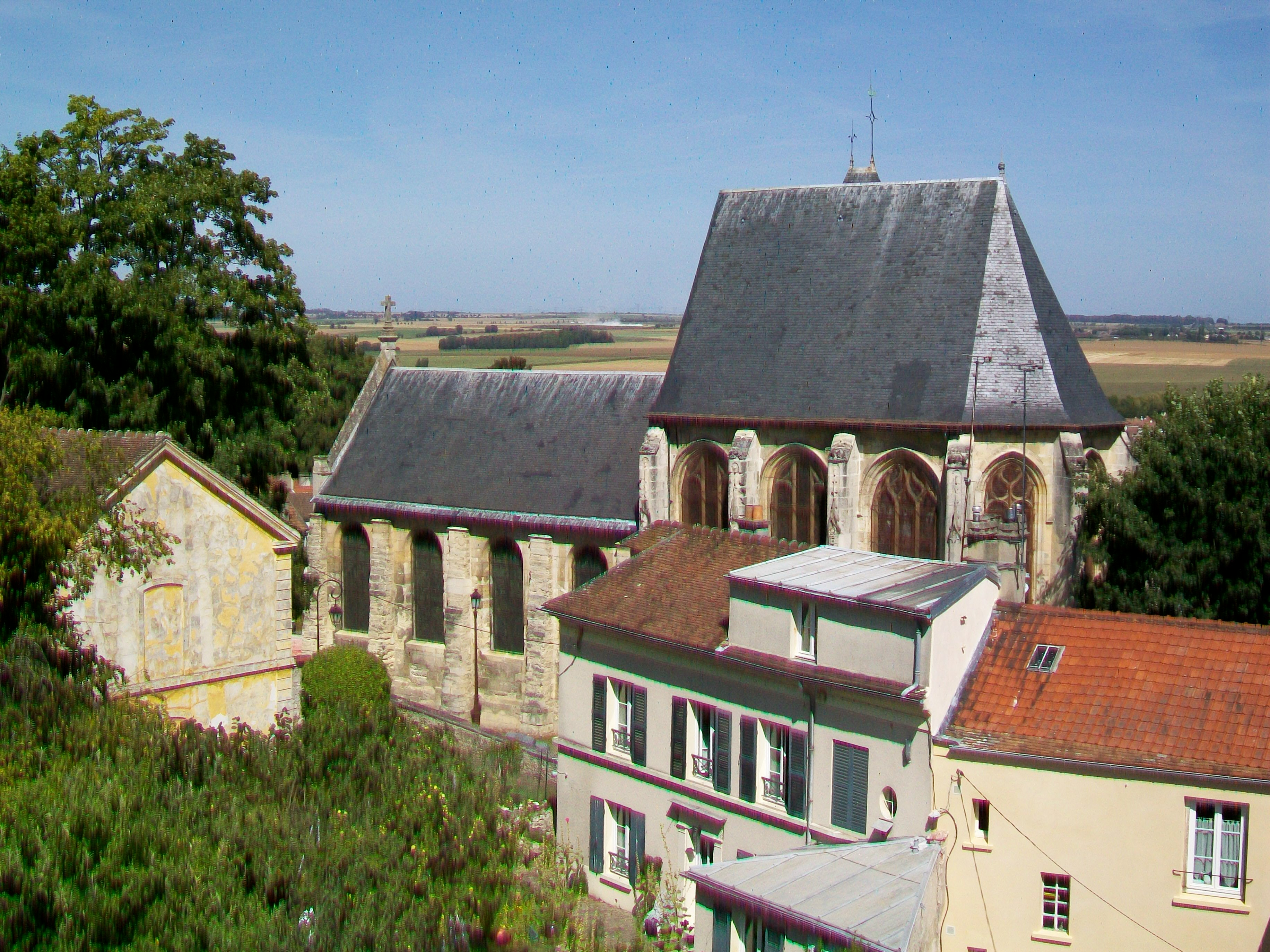 Vue sur l'église depuis la terrasse devant le portail est du château.